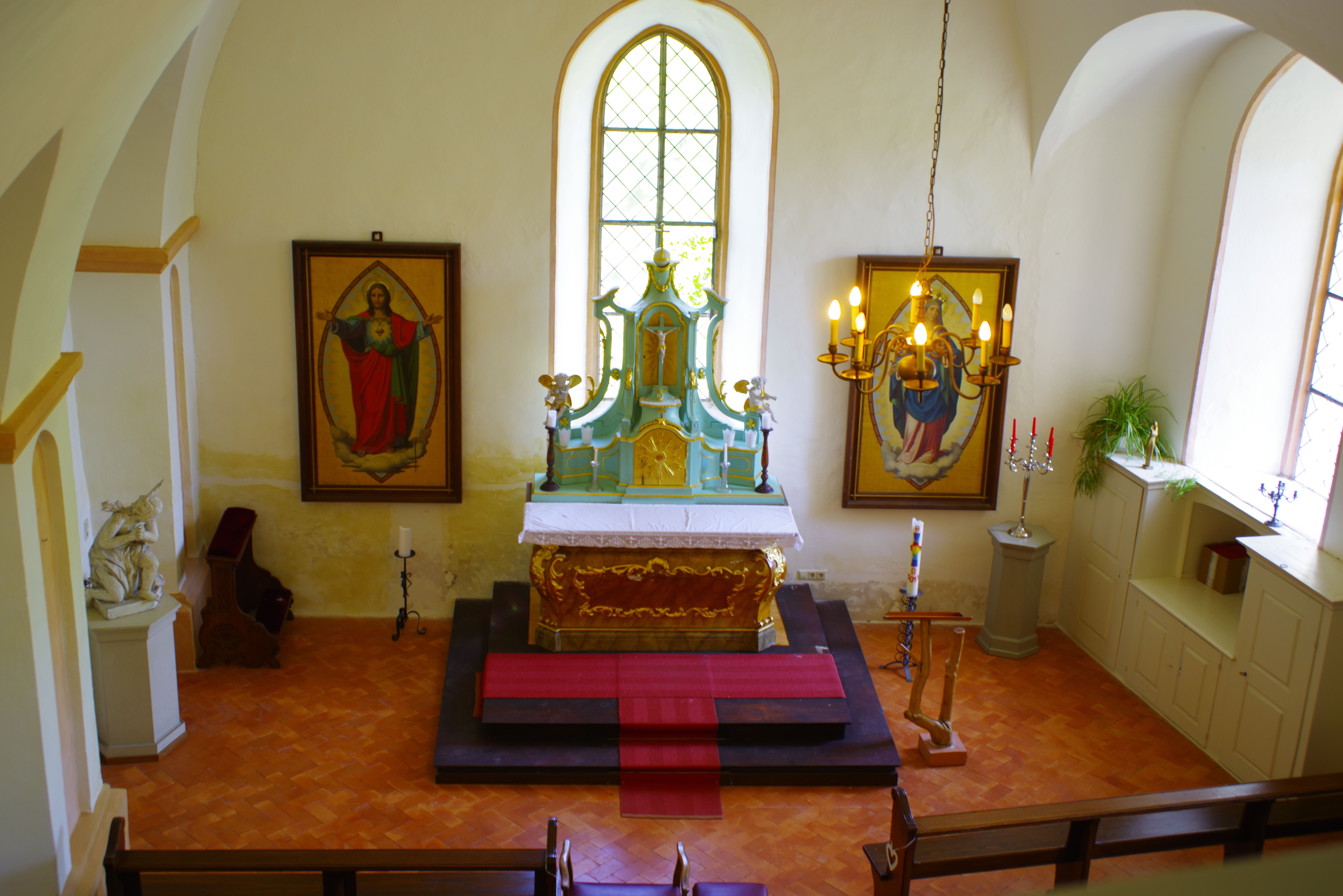 Schlosskapelle Schloss Hohenlupfen